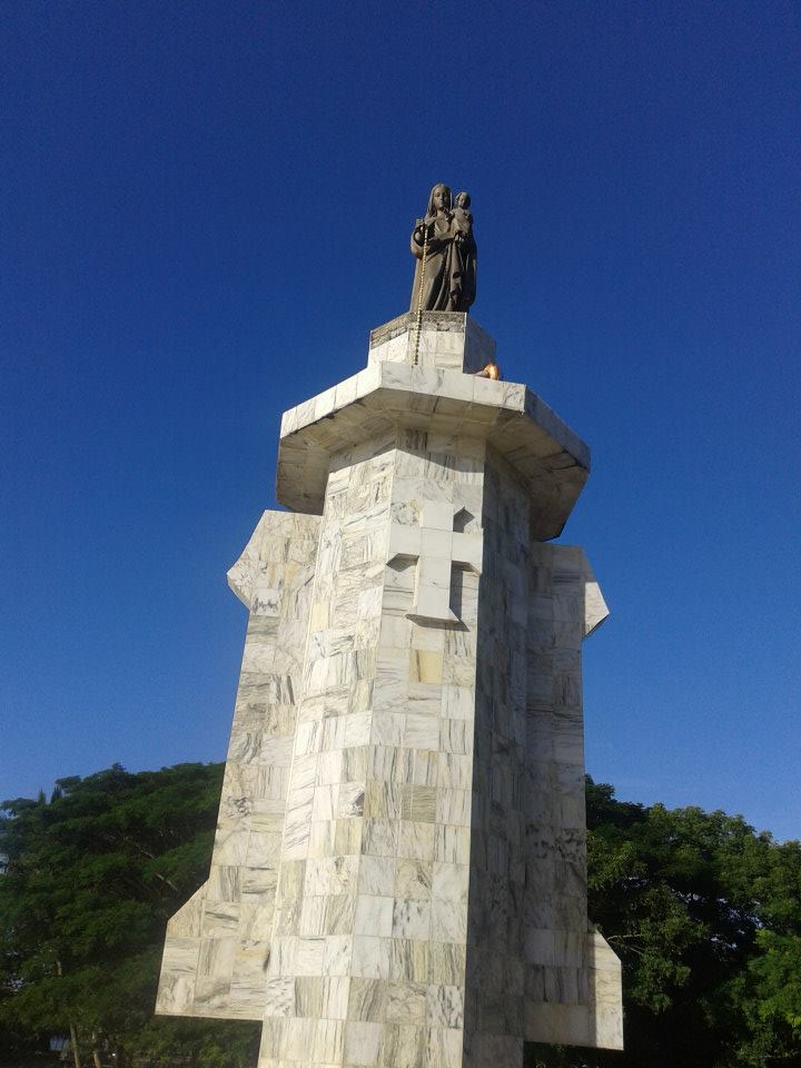 Madonnenstatue in Pante Macassar